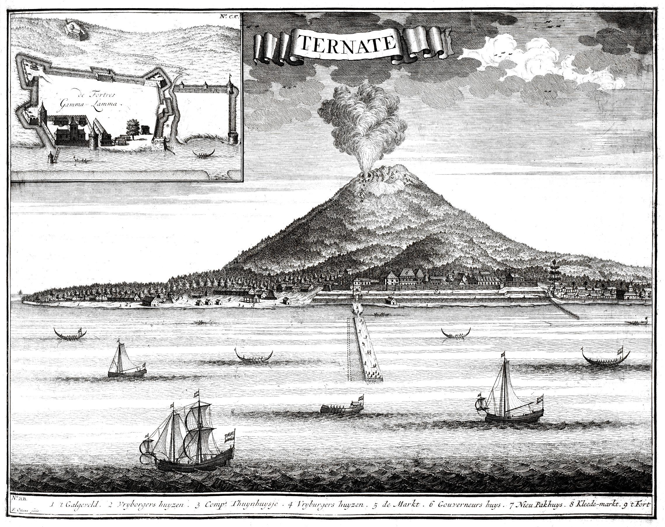 Ternate im Jahr 1720